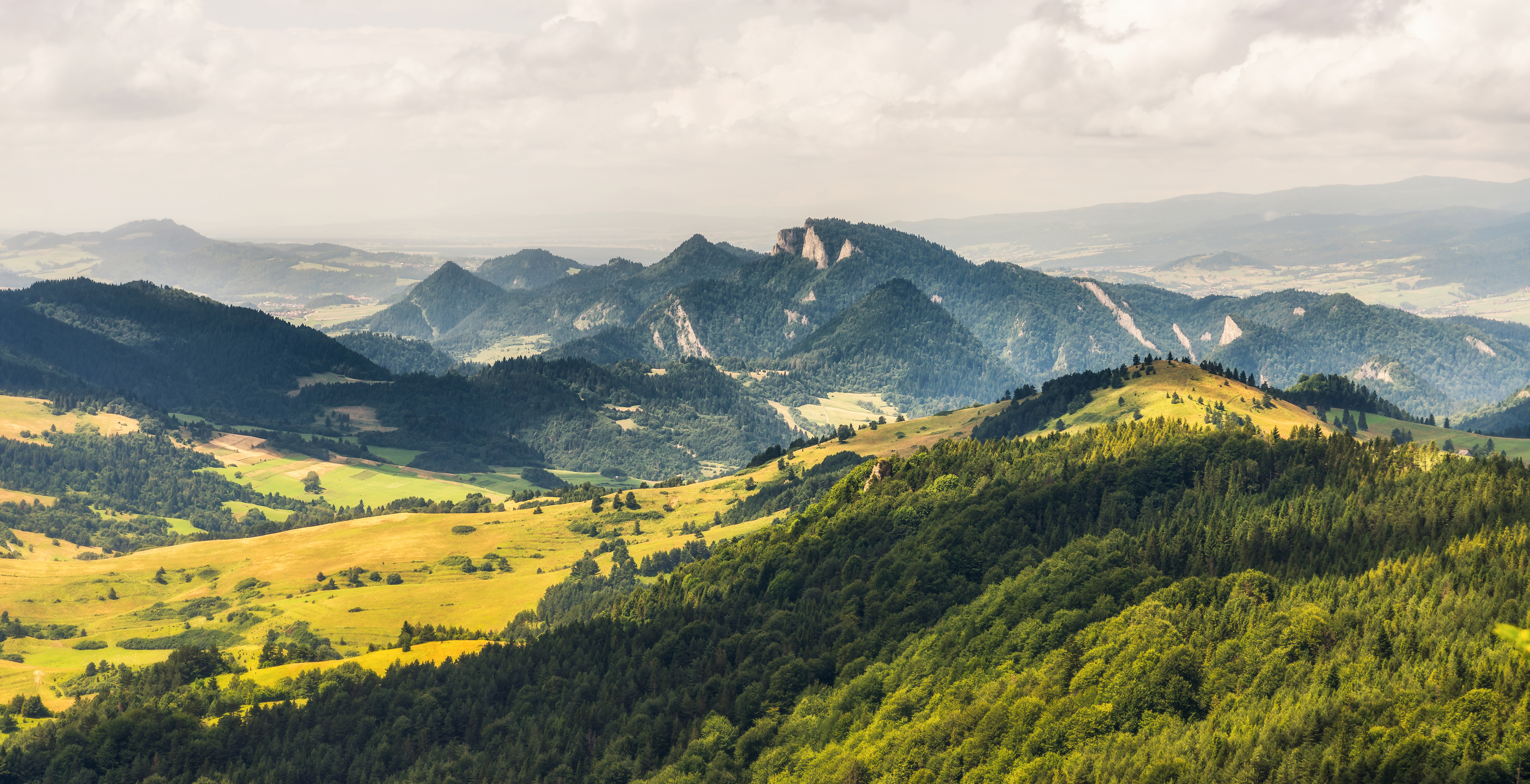 Obszar specjalnej ochrony ptaków Pieniny. This is a photography of Natura 2000 protected area with ID PLB120008